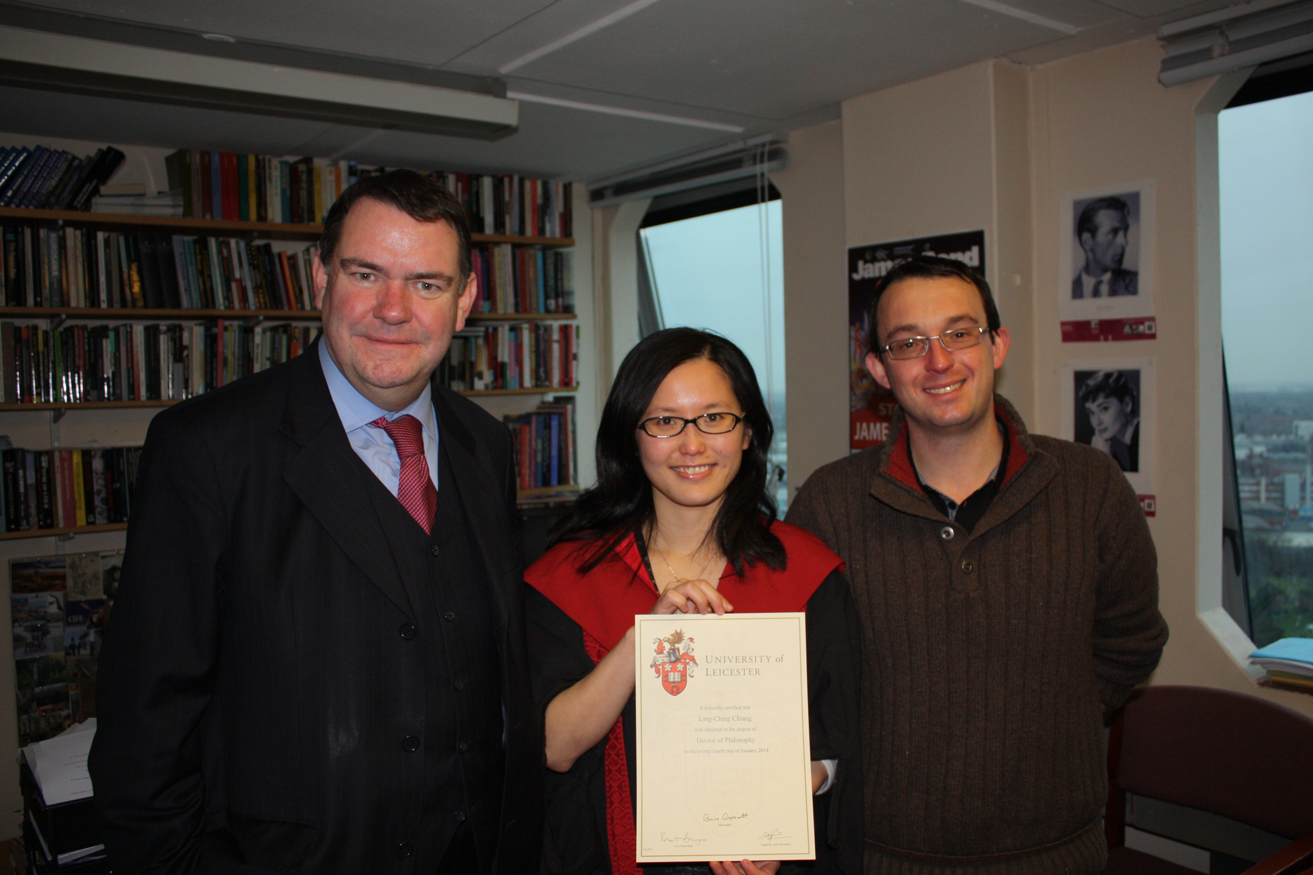 江凌青博士畢業時與指導教授、系主任合影